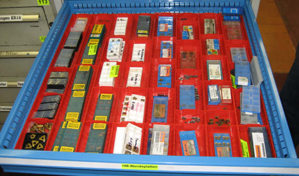 Werkzeugkomponenten (Wendeschneidplatten) an Lager